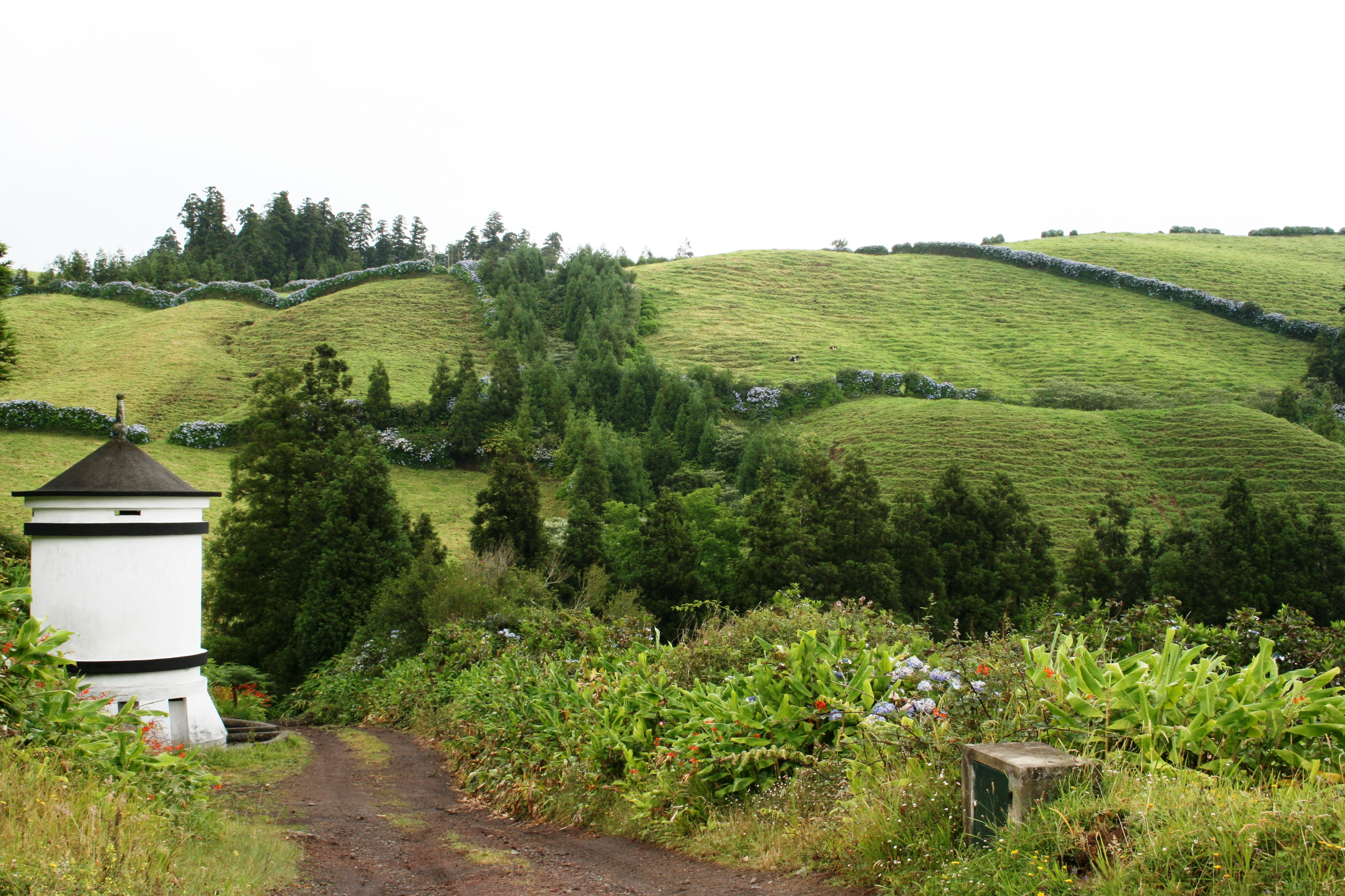 Sao Miguel Azores